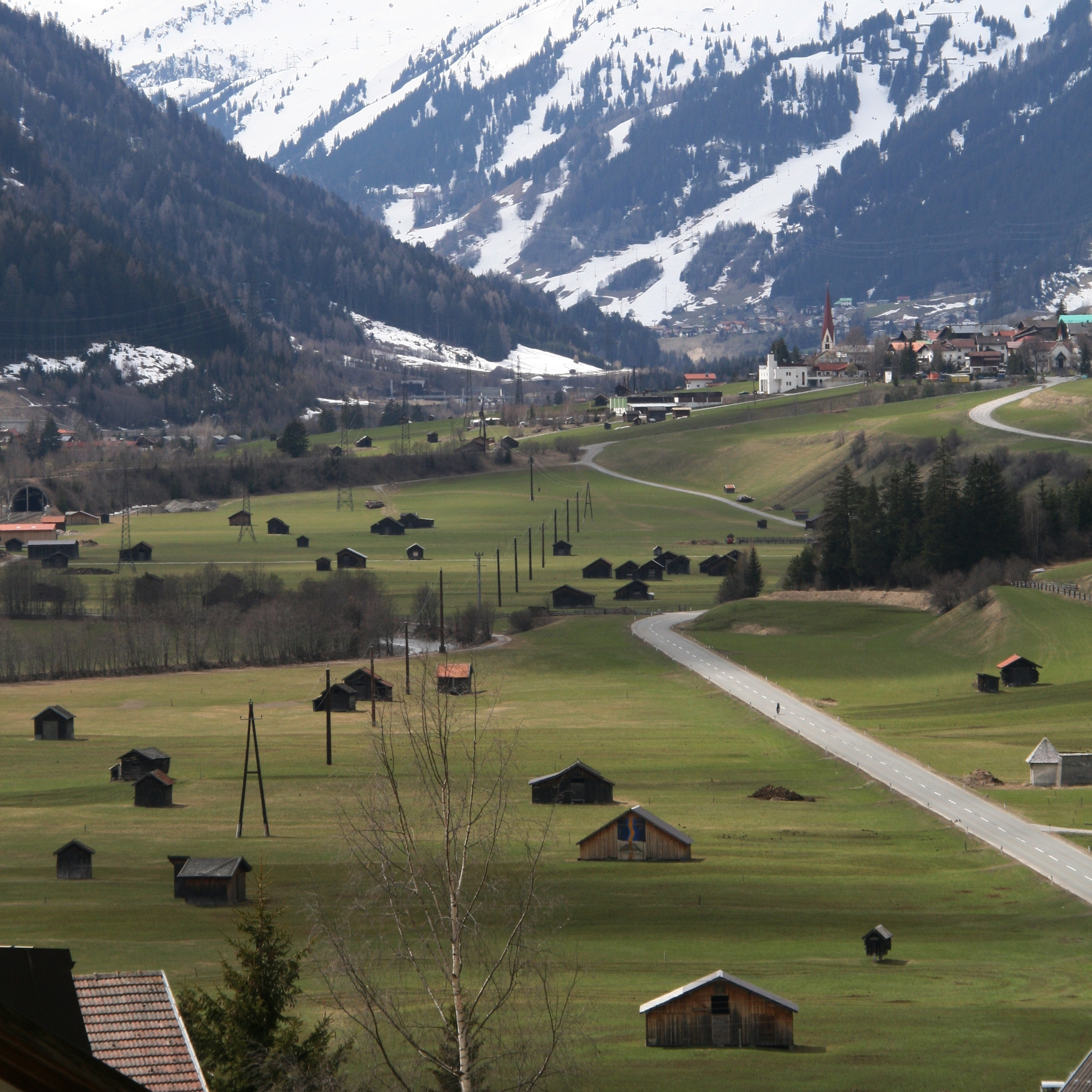 Riedhütten, Blick von Schnann auf Pettneu am Arlberg in Tyrol.